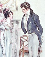 Détail d'une gravure en couleur de Brock - et non de Thomson - pour le ch. 20 de Persuasion de Jane Austen, montrant Anne et Frederick Wentworth en conversation dans la salle de concert de Bath